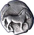 Лесен тетробол